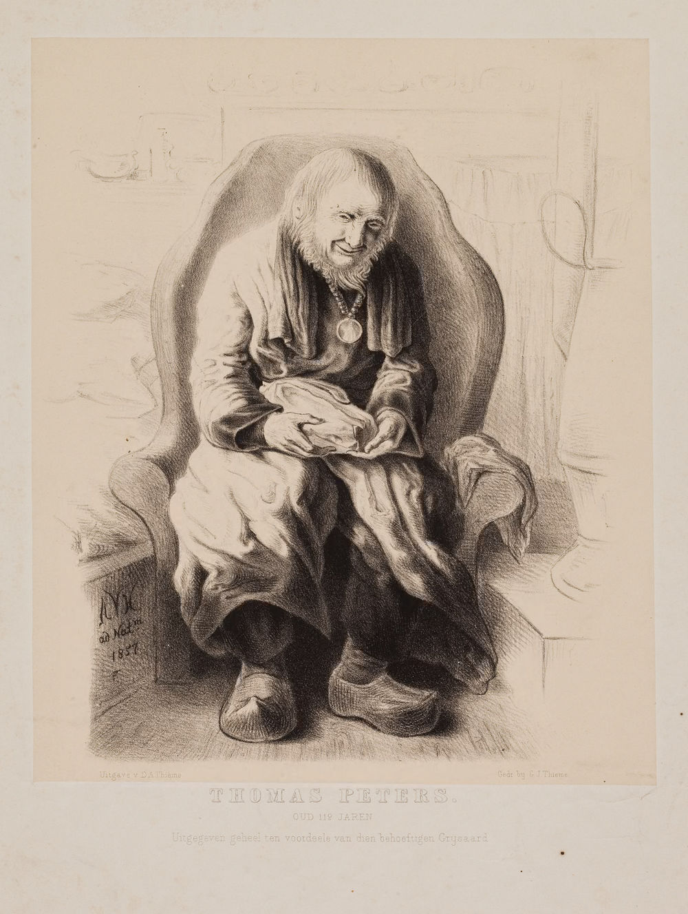 Thomas Peters in 1857, uitgave D.A. Thieme. Onderschrift luidt: uitgegeven geheel ten voordeele van dien behoeftigen grijsaard.